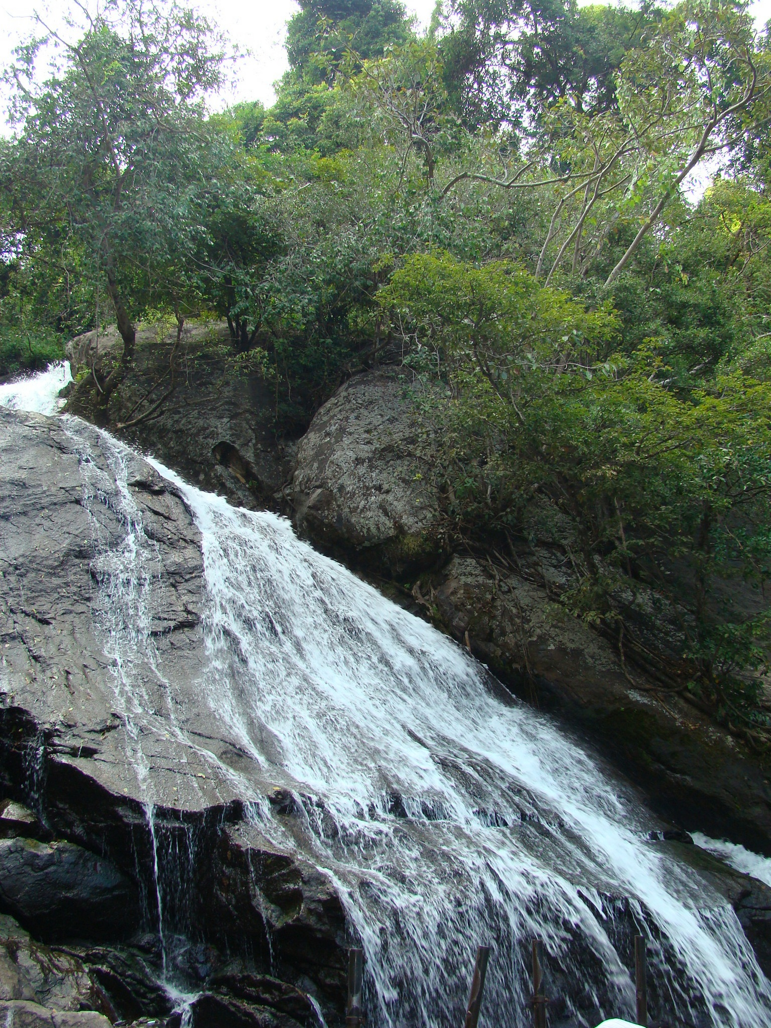 Monkey Falls at Valparai, Anamalai Hills.